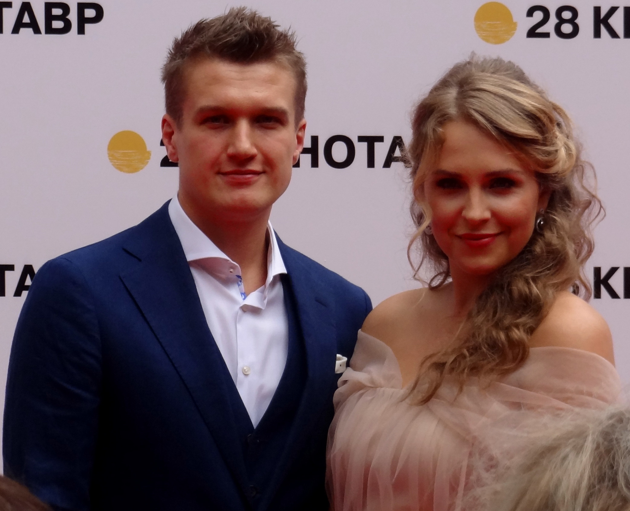 Анатолий Руденко и Елена Дудина на 28 кинофестивале "Кинотавр" в Сочи в 2017 году.